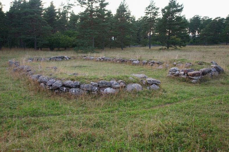 Fröjel 31:3 (1). Järnåldersboplats från ca 200 f.Kr - 550 e.Kr. Motiv: Fröjel 31:3 (1) Nyckelord: Riksintressen Kategori: Husgrund, förhistorisk/medeltida Fröjel 31:3 (1). Järnåldersboplats från ca 200 f.Kr - 550 e.Kr. Fröjel 31:3 (1).